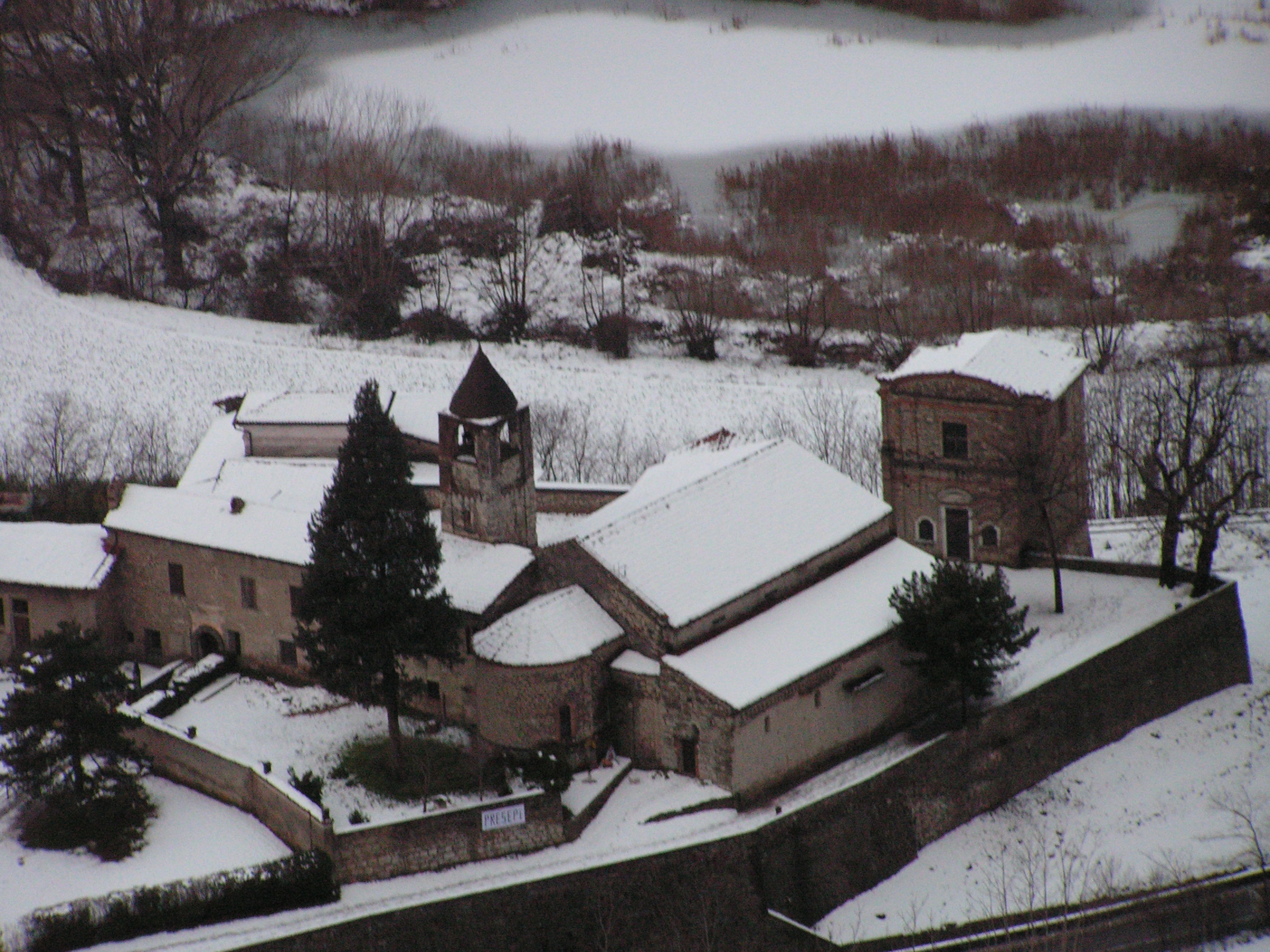 Vista dall'alto del Monastero di San Pietro in Lamosa a Provaglio d'Iseo